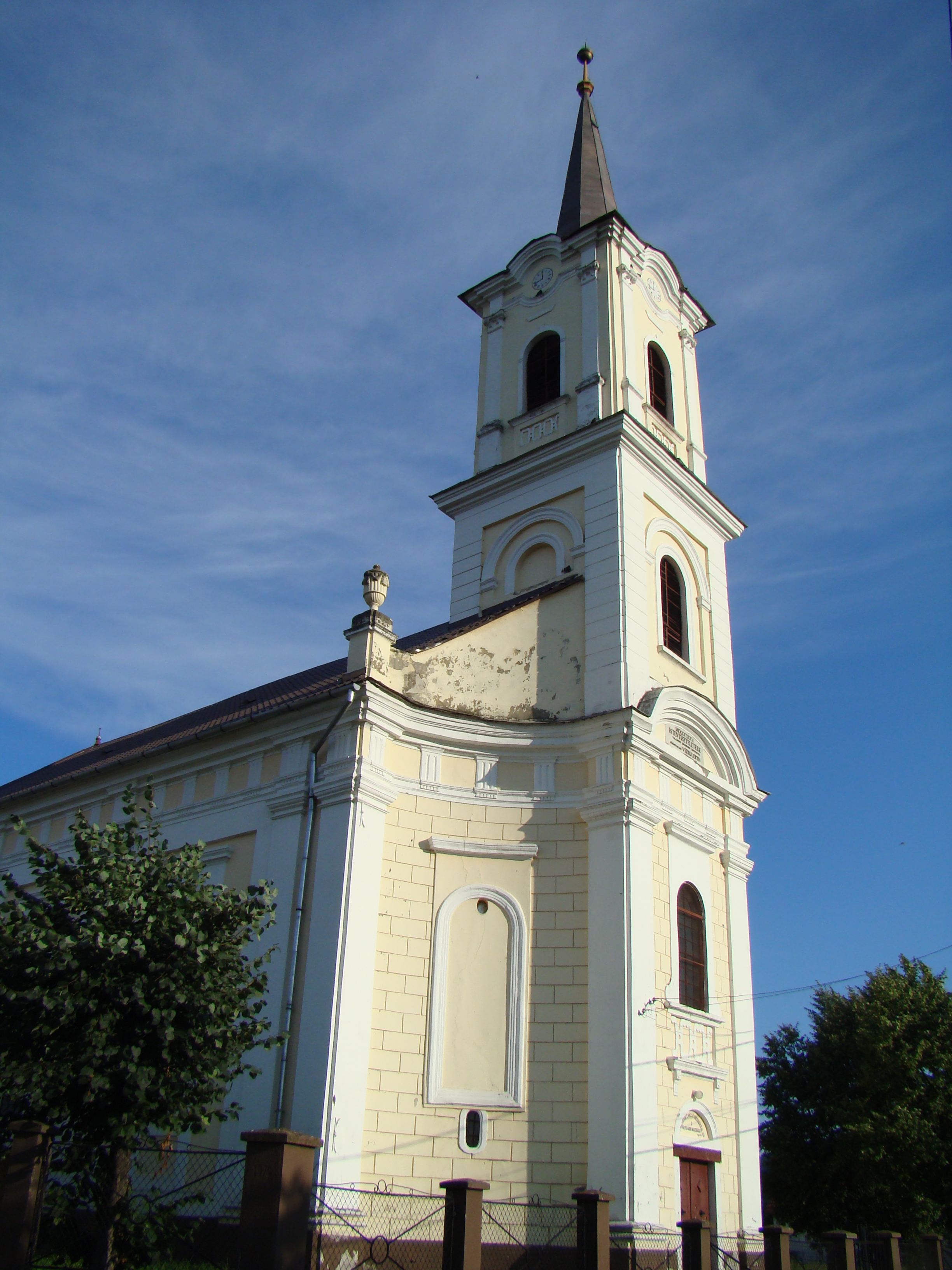 Biserica reformată din Sărata